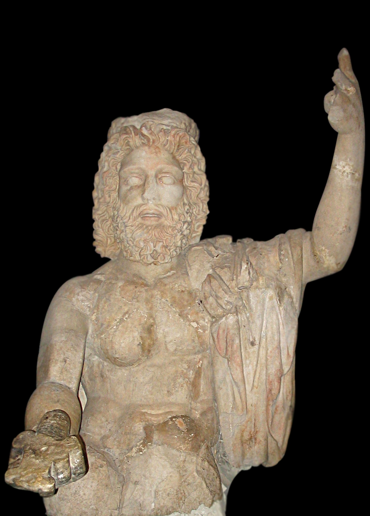 Giove Capitolino, scultura romana II sec., ex Museo nazionale del Bardo,Tunisi.